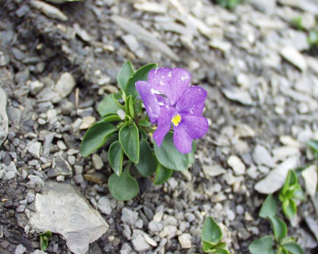 (en) Viola of Cenesia's montain (Viola cenisia), a photography originating of the internet site The accord of the autor, H. Brisse, is here. (fr) Pensée du mont Cenis (Viola cenisia), une photographie issue du site internet L'accord de l'auteur, H. Brisse, se situe ici.